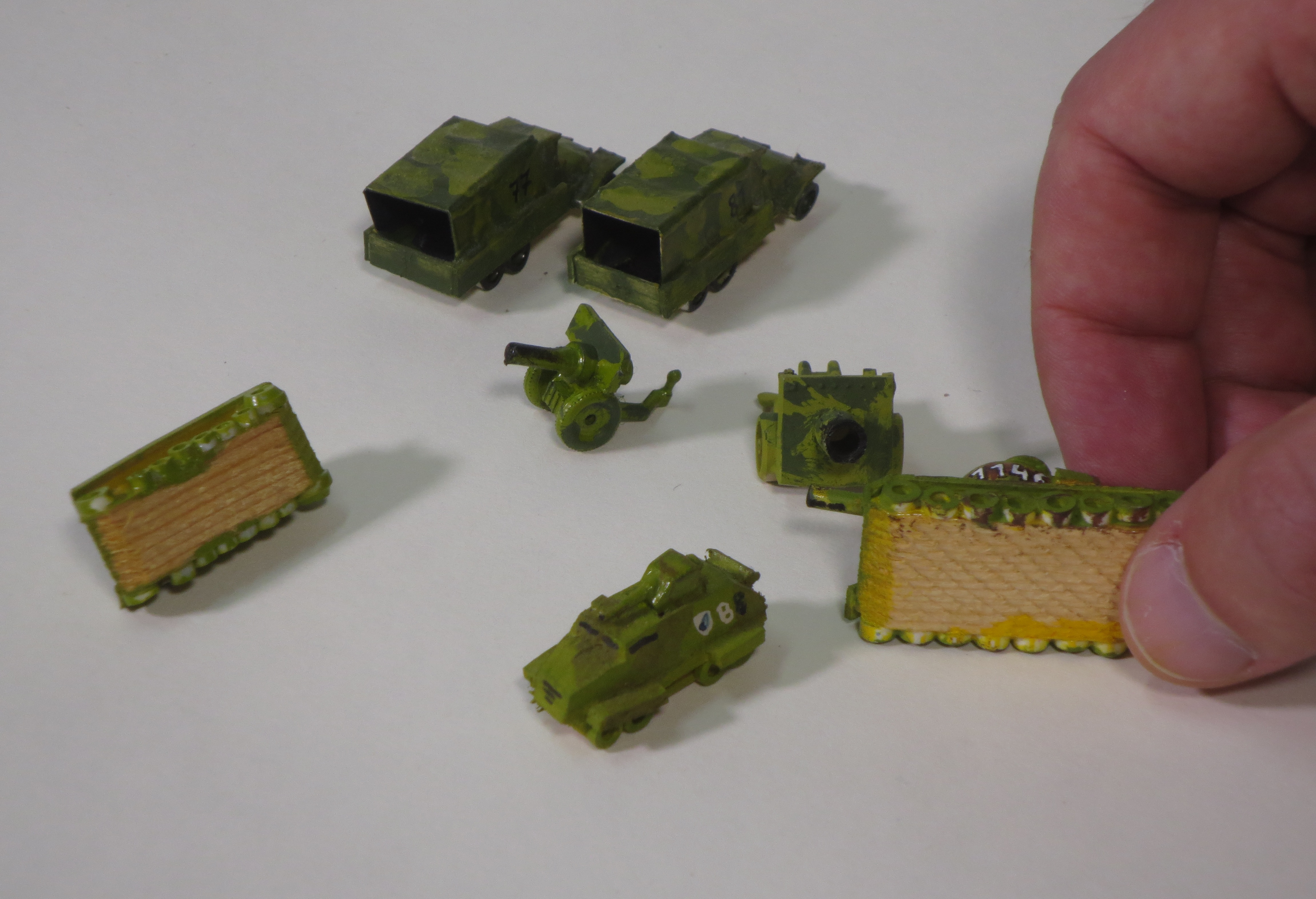 Pelaajan itse tekemiä miniatyyrisotapelin nappuloita